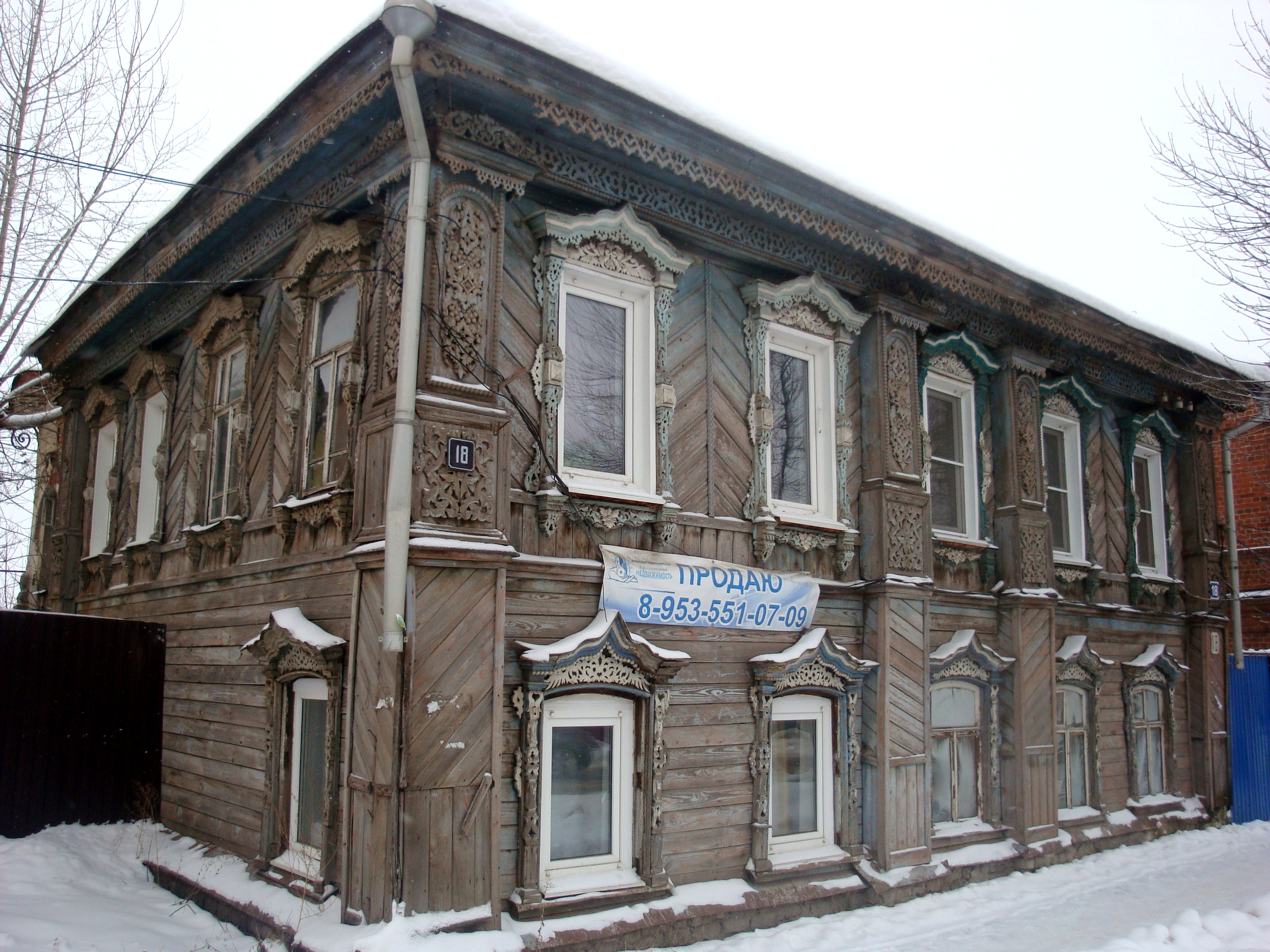 жилой дом Верхоглядовой (Нижегородская область, Арзамас, улица Володарского, 18)